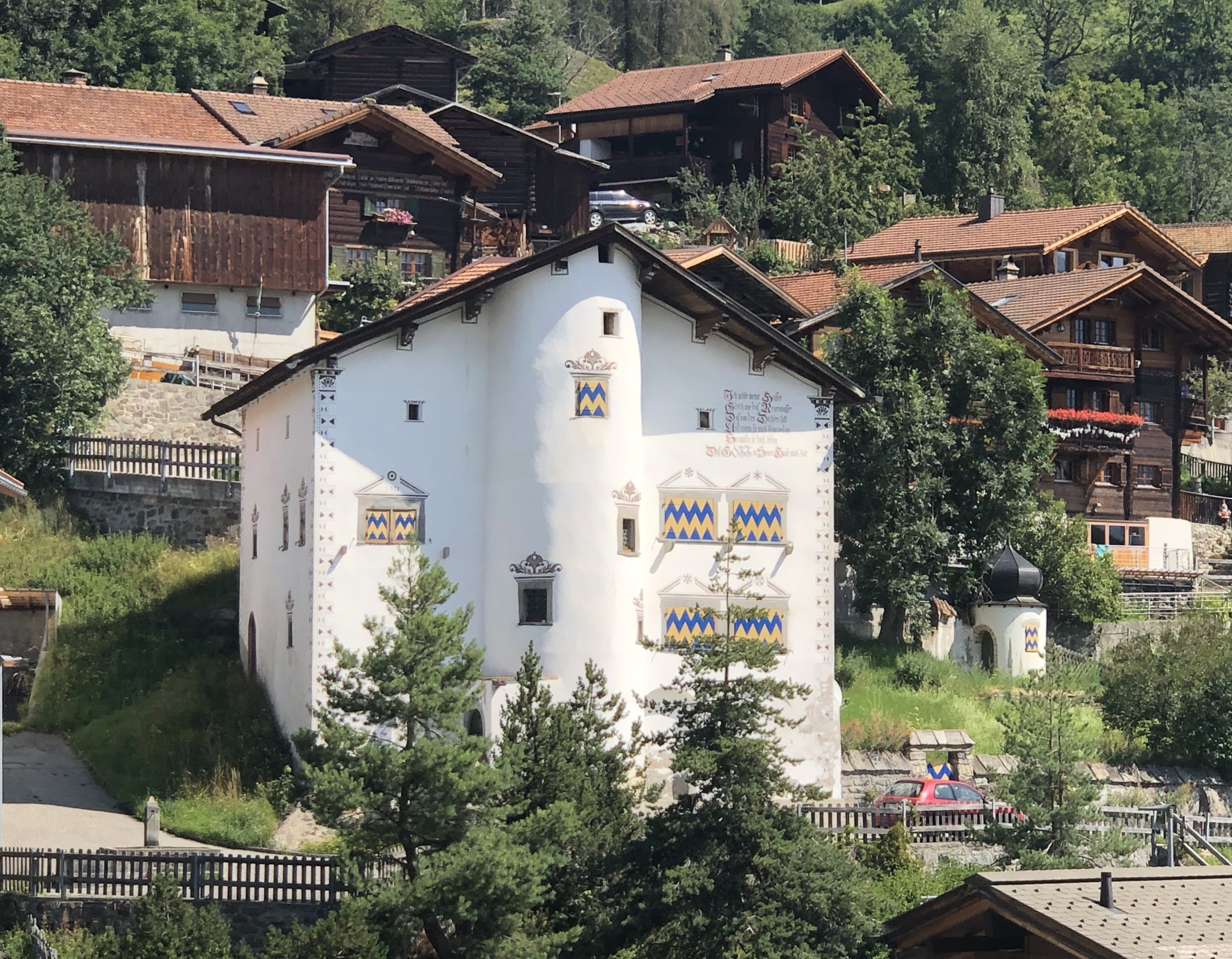 Castiel, Hasu des Podestà